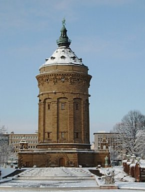 Wasserturm in Mannheim Selbst fotografiert am 5.1.2003 19:29, 12. Dez 2005 Dominik 290 x 385 (23932 Byte) (etwas geschärft) 22:13, 18. Aug 2005 Dominik 290 x 390 (60542 Byte) (leichte begradigung) 13:38, 27. Dez 2003 Spacefrank 300 x 400 (52848 Byte) (Mannheim Wasserturm)